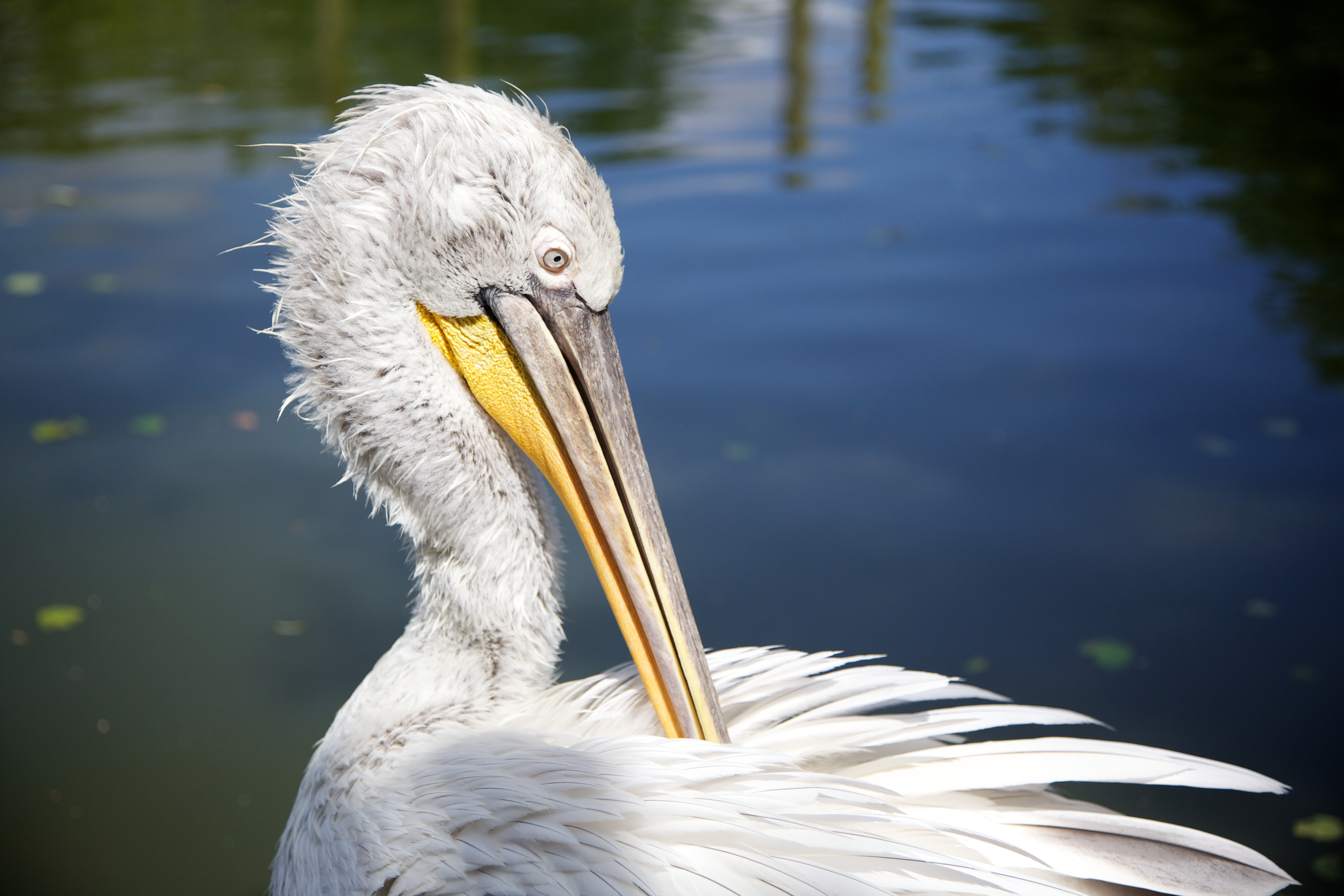 Dalmatian Pelican